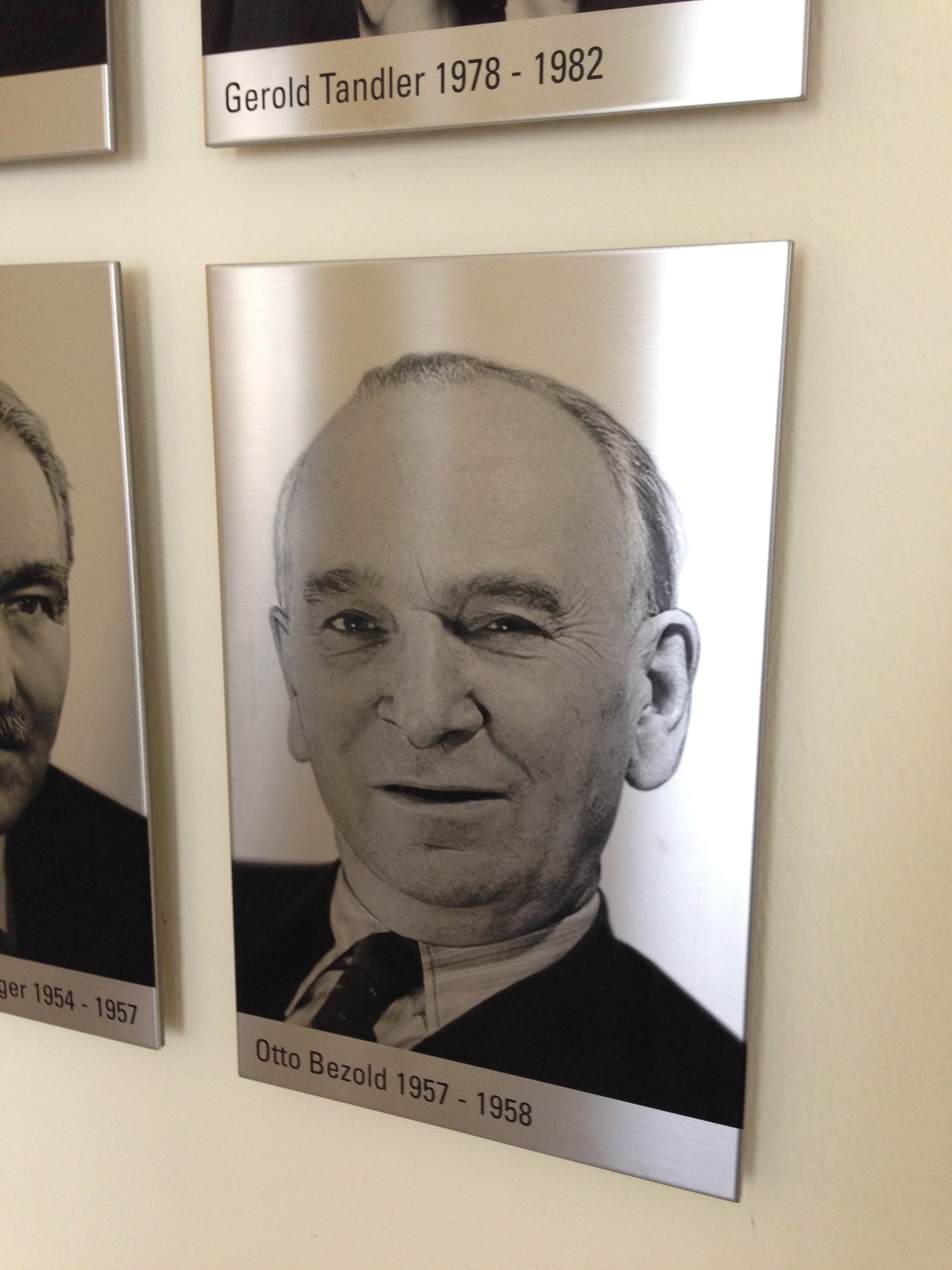 Fotografie von Otto Bezold im Bayerischen Innenministerium